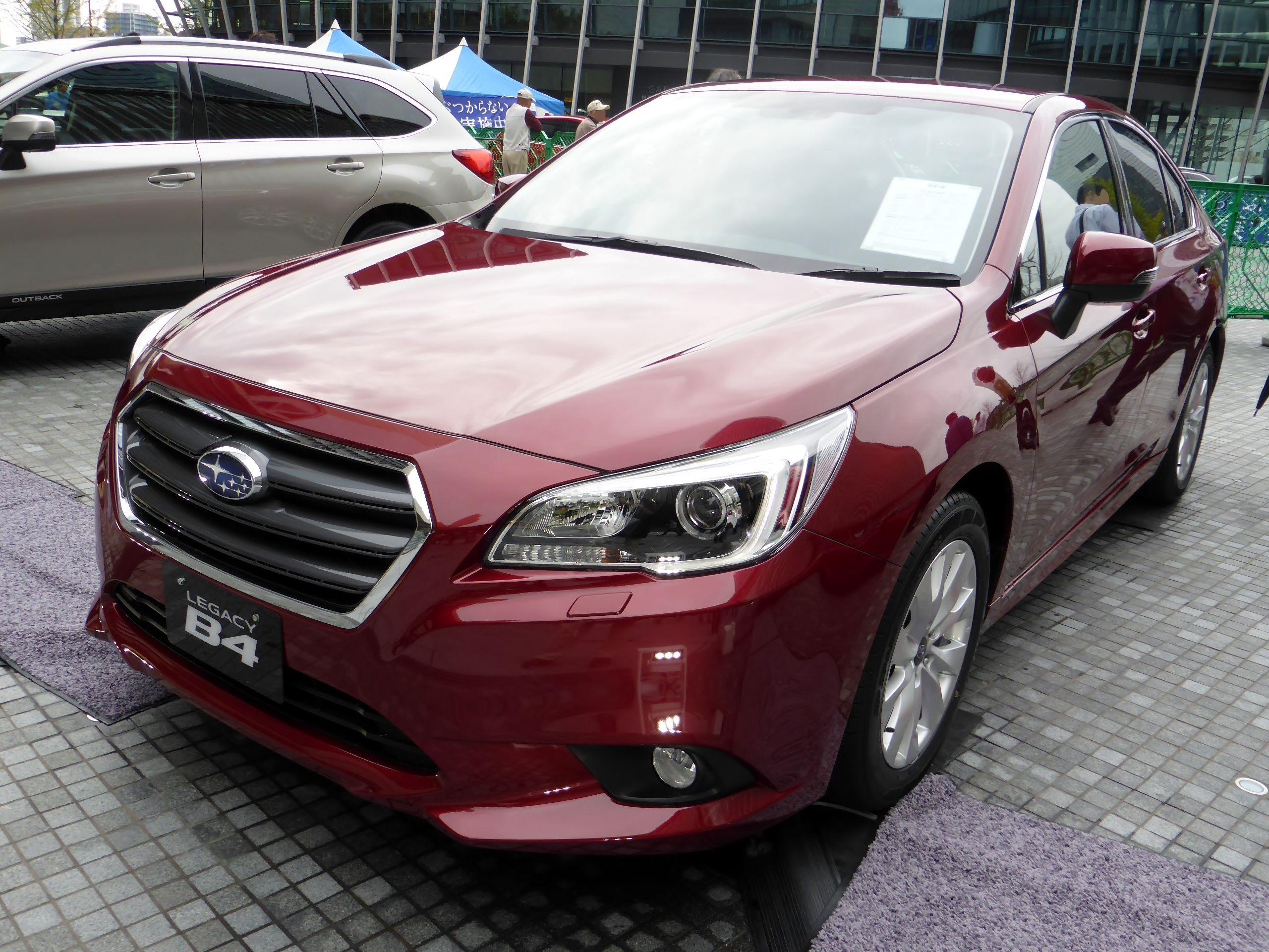 BN9型スバル・レガシィB4をフロントから撮影。